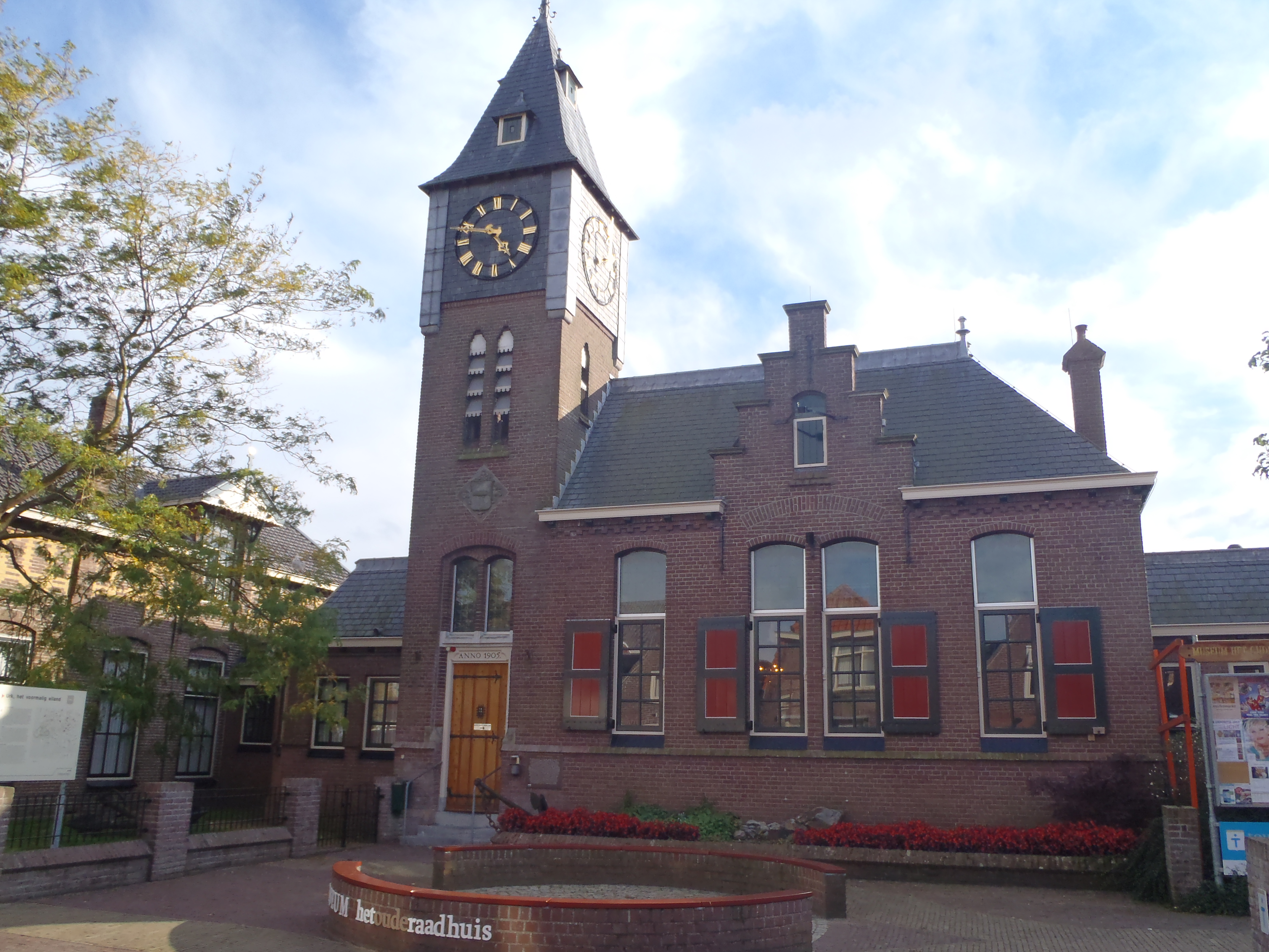 Dit was vroeger het gemeentehuis maar het is nu een museum wel er wordt er nog steeds getrouwd.